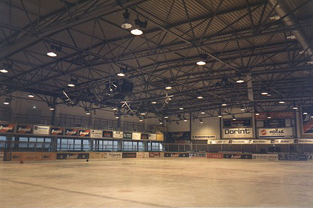 Innenansicht der Erfurter Eishalle :Kategorie:Erfurt